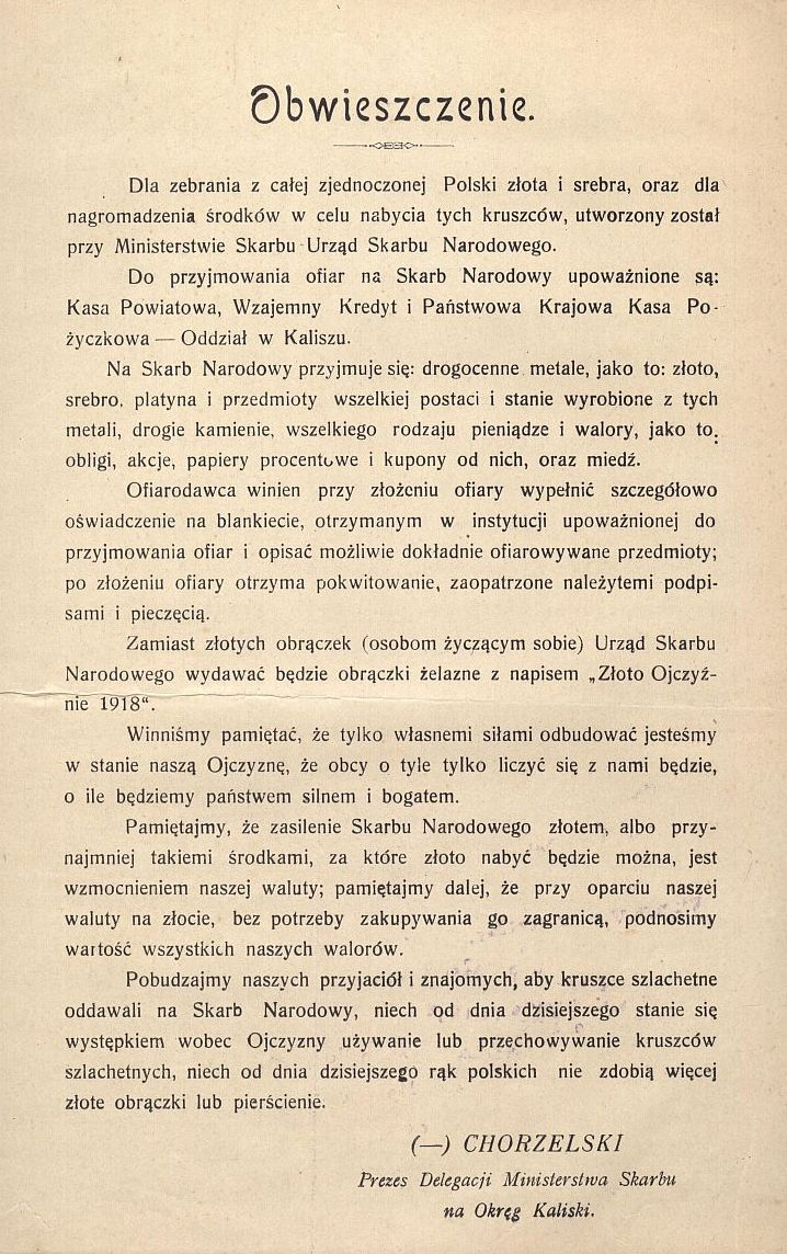 "Obwieszczenie" o zbiórce na Skarb Narodowy, Kalisz 1918